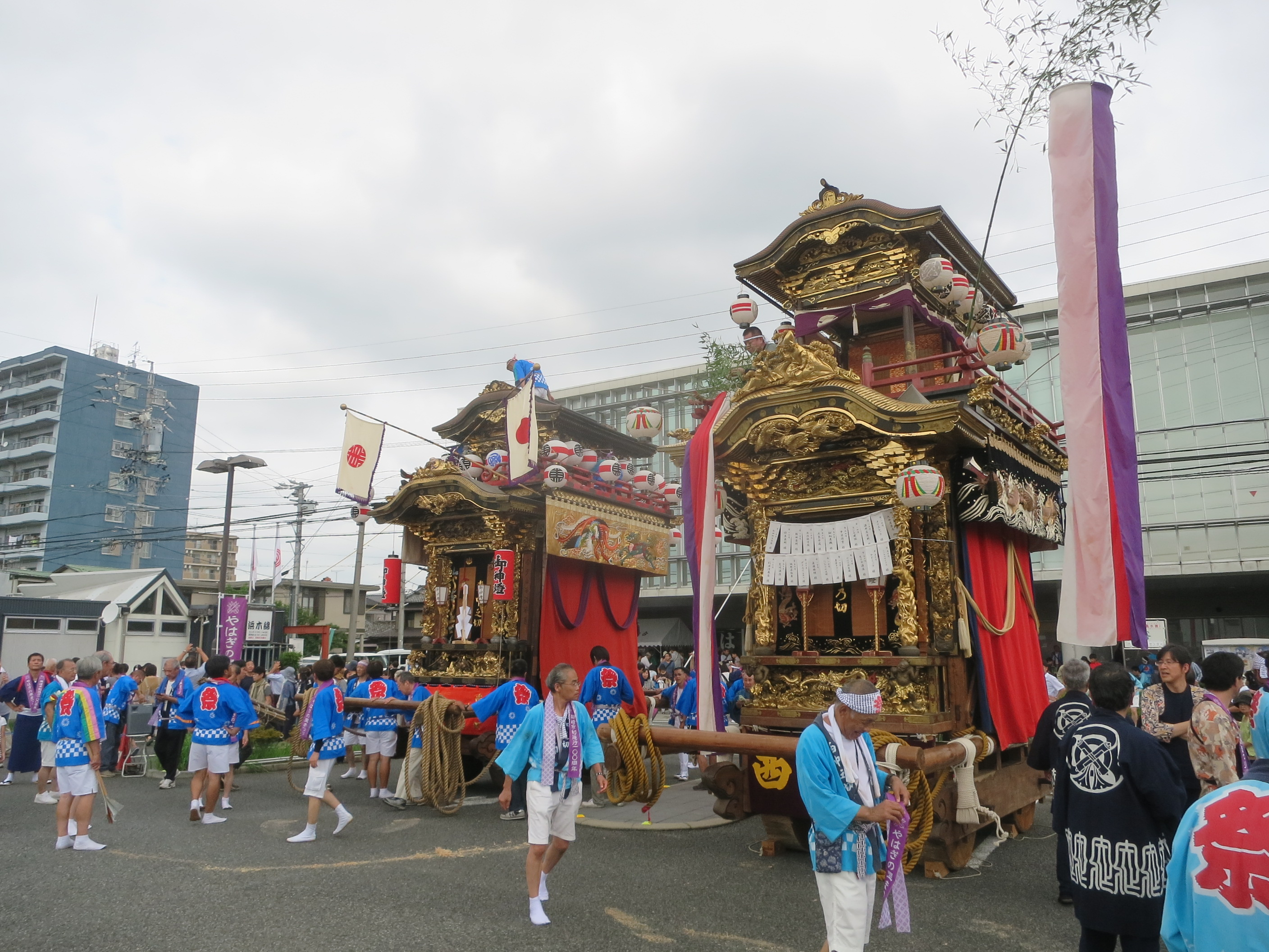 矢作神社秋の大祭（岡崎市西部地域交流センター・やはぎかんの前）